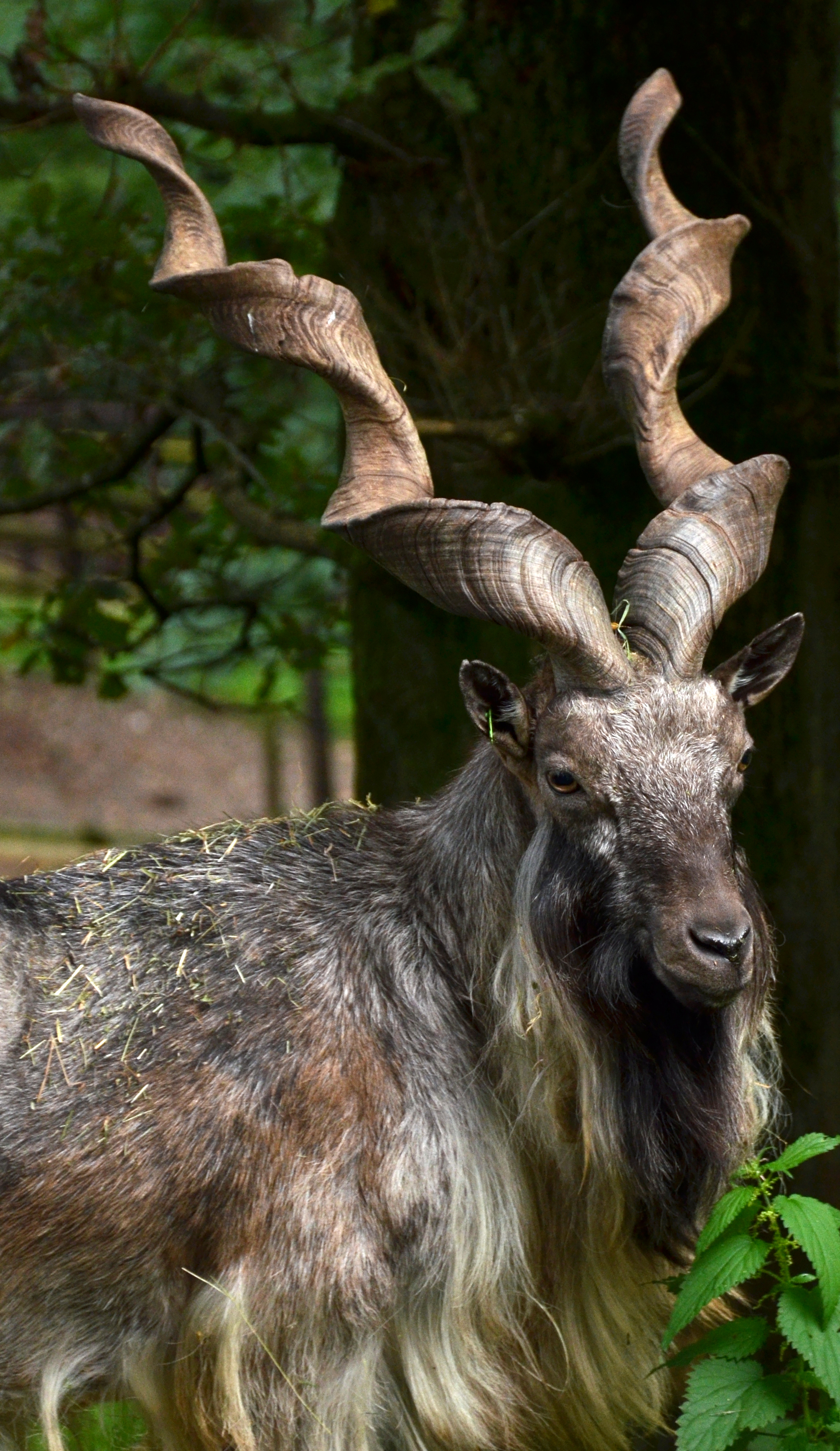 Markhor ( Capra falconeri ) au parc animalier de Bouillon.